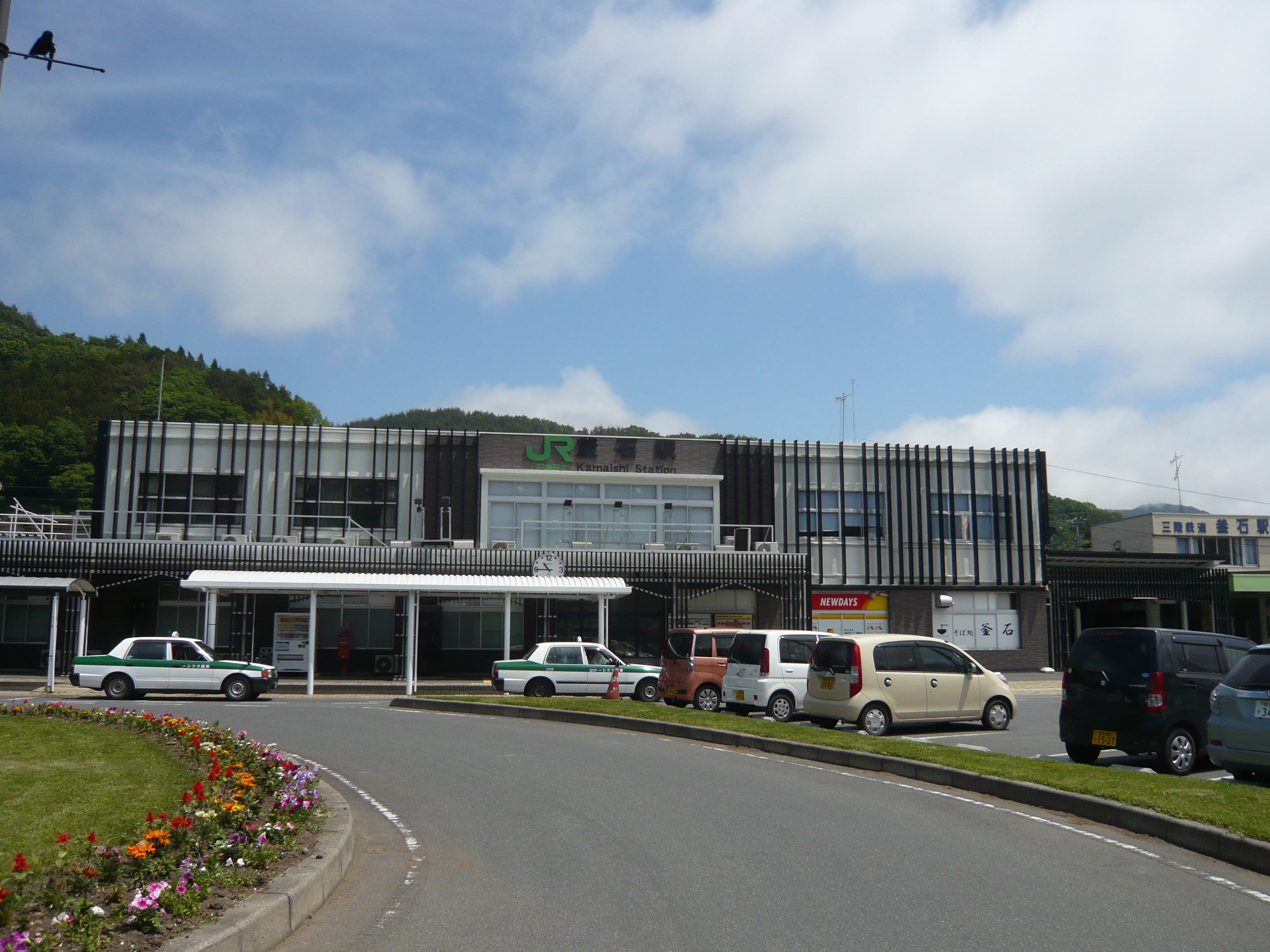 釜石駅（2013年6月1日）